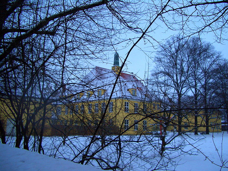 Grundschule an der Ostpreußenstraße München-Englschalking von Süd-West